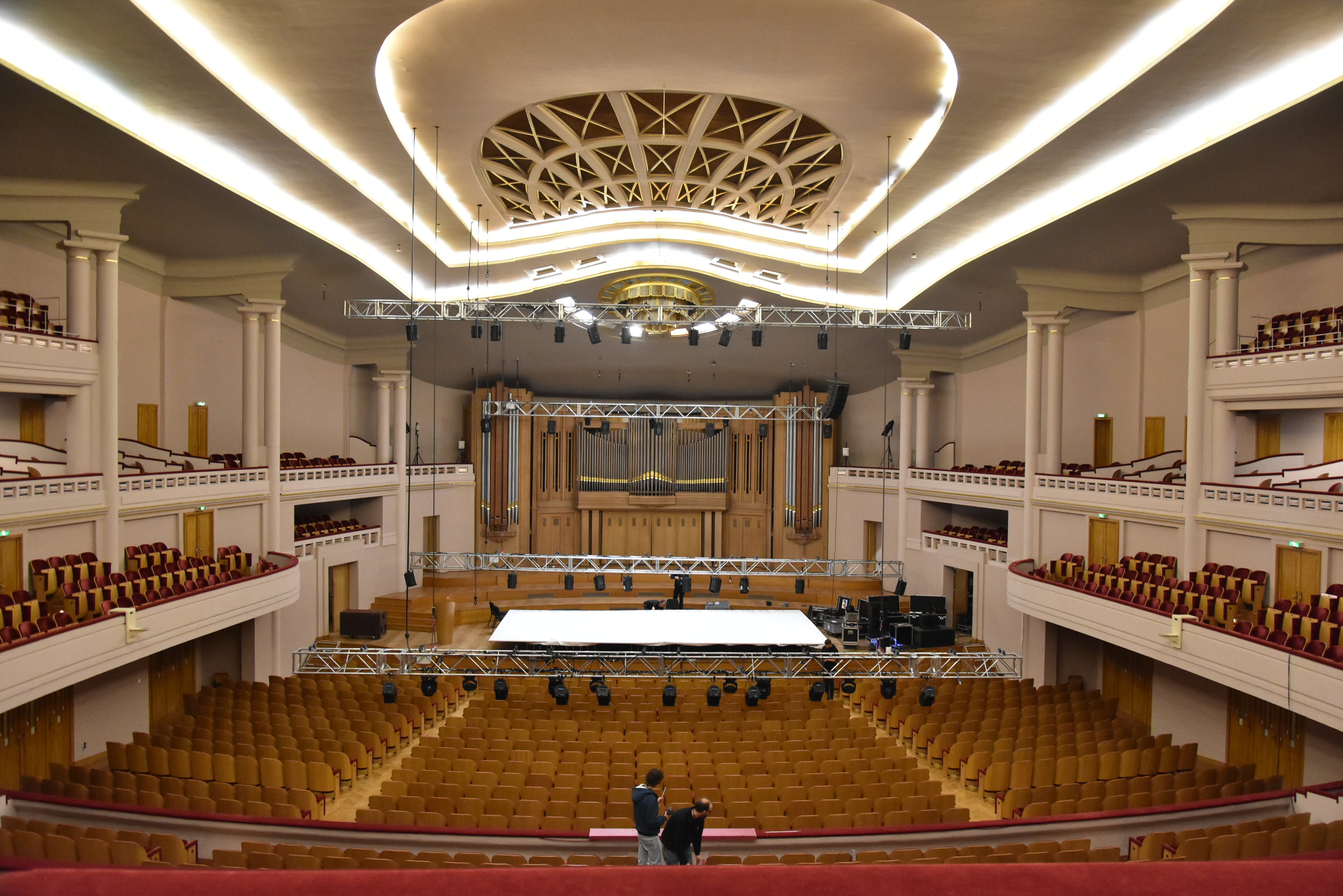 Brussel Bozar Grote zaal Henry Le Boeuf 29-01-2019